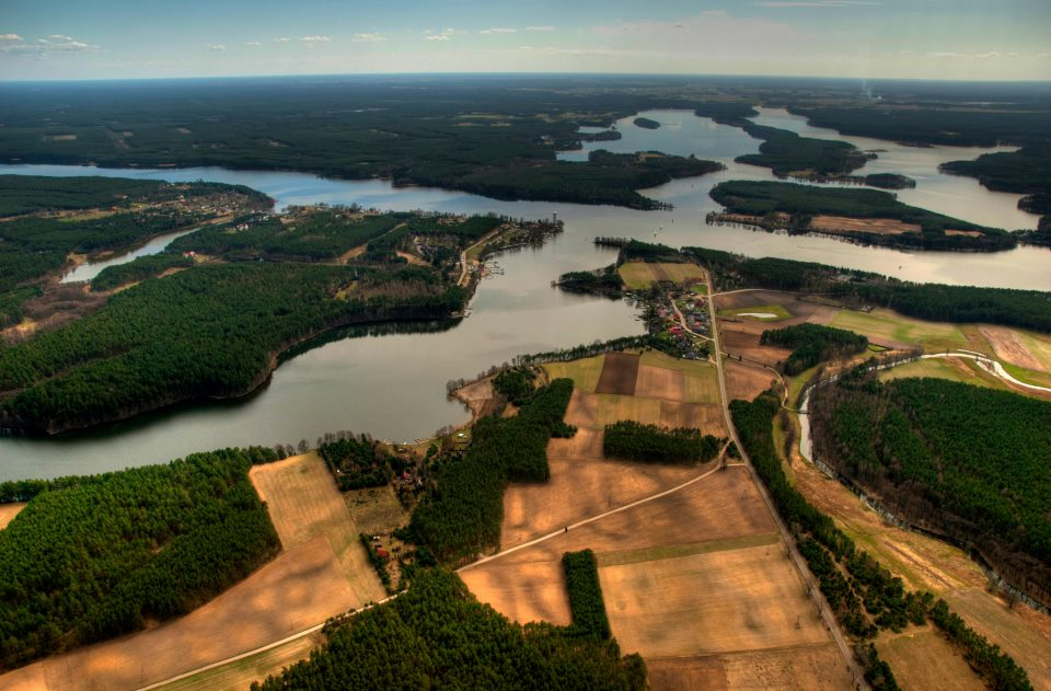 Czarlina z lotu ptaka.